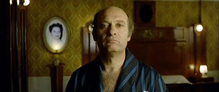 Turi Ferro in Malizia